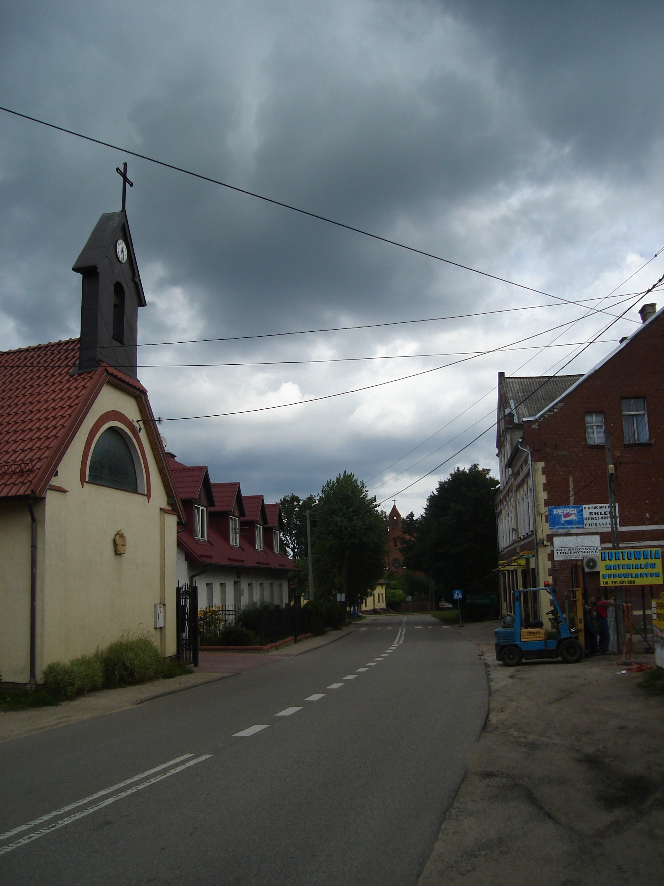 Ulica w Ukcie, po lewej kaplica Kościoła Ewangelicko-Augsburskiego, w głębi kościół pw. Podwyższenia Krzyża Świętego